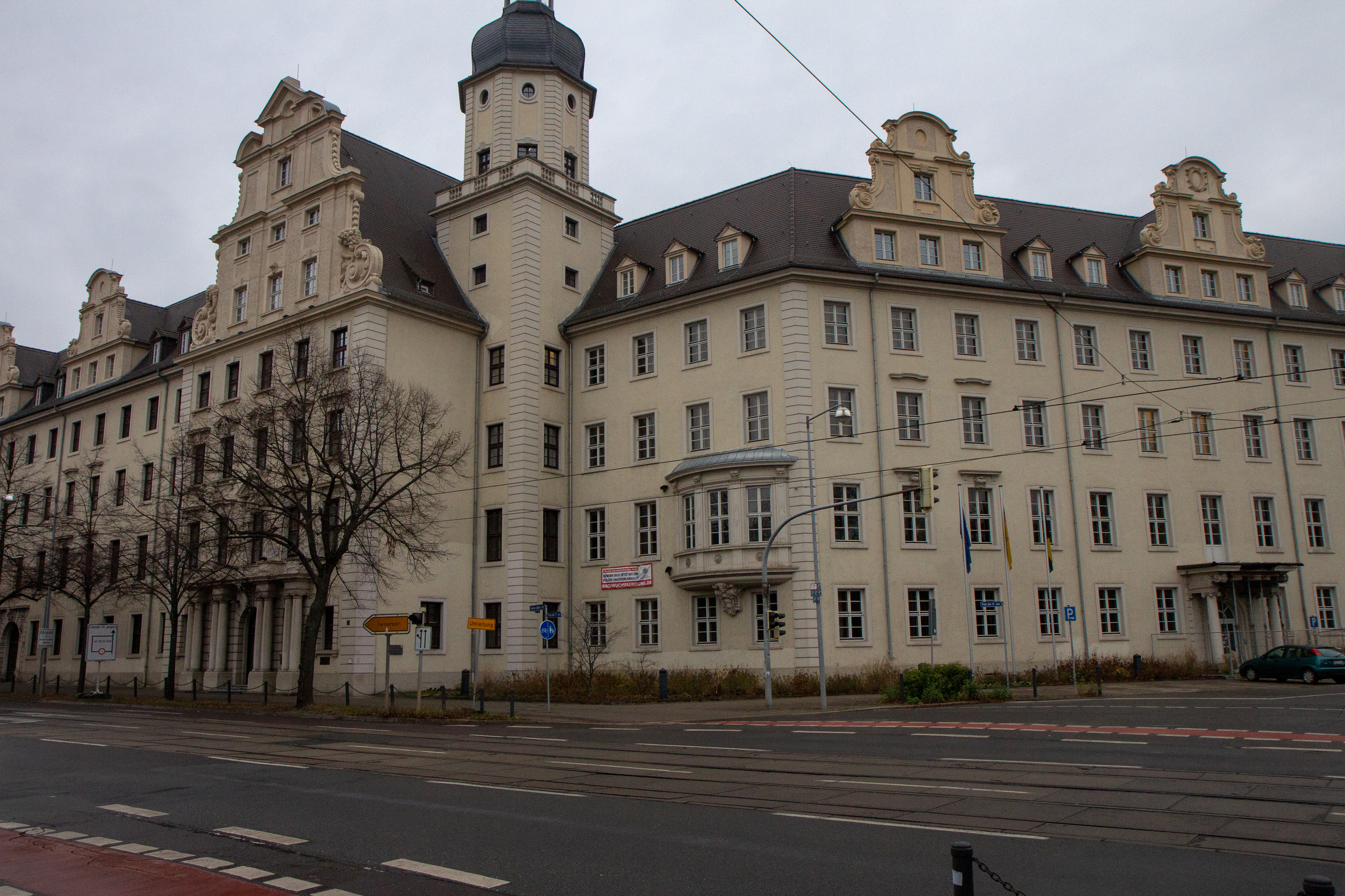 Ministerium für Inneres und Sport des Landes Sachsen-Anhalt in Magdeburg